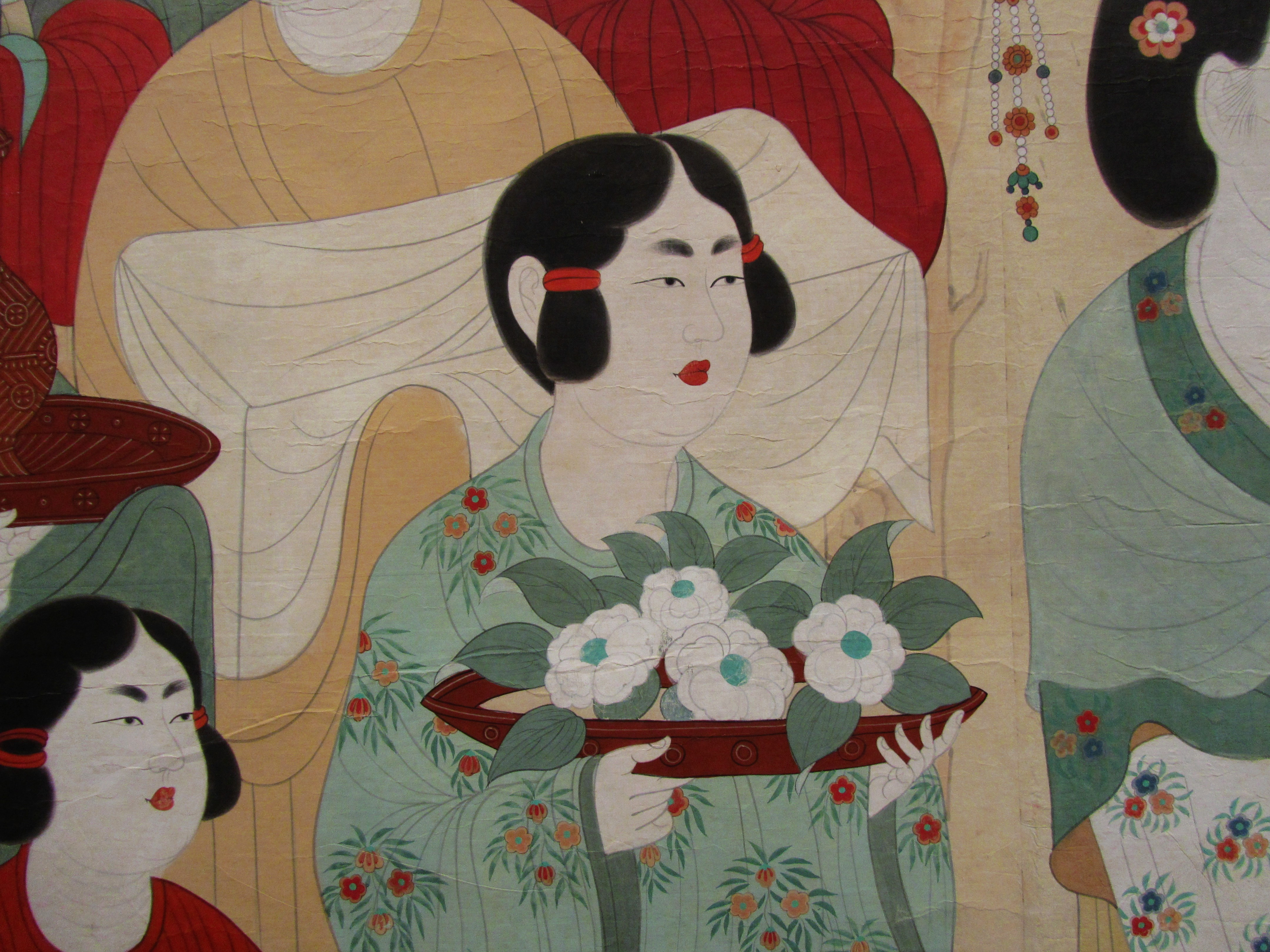 敦煌莫高窟第130窟盛唐都督夫人太原王氏供养像局部，婢女装束。